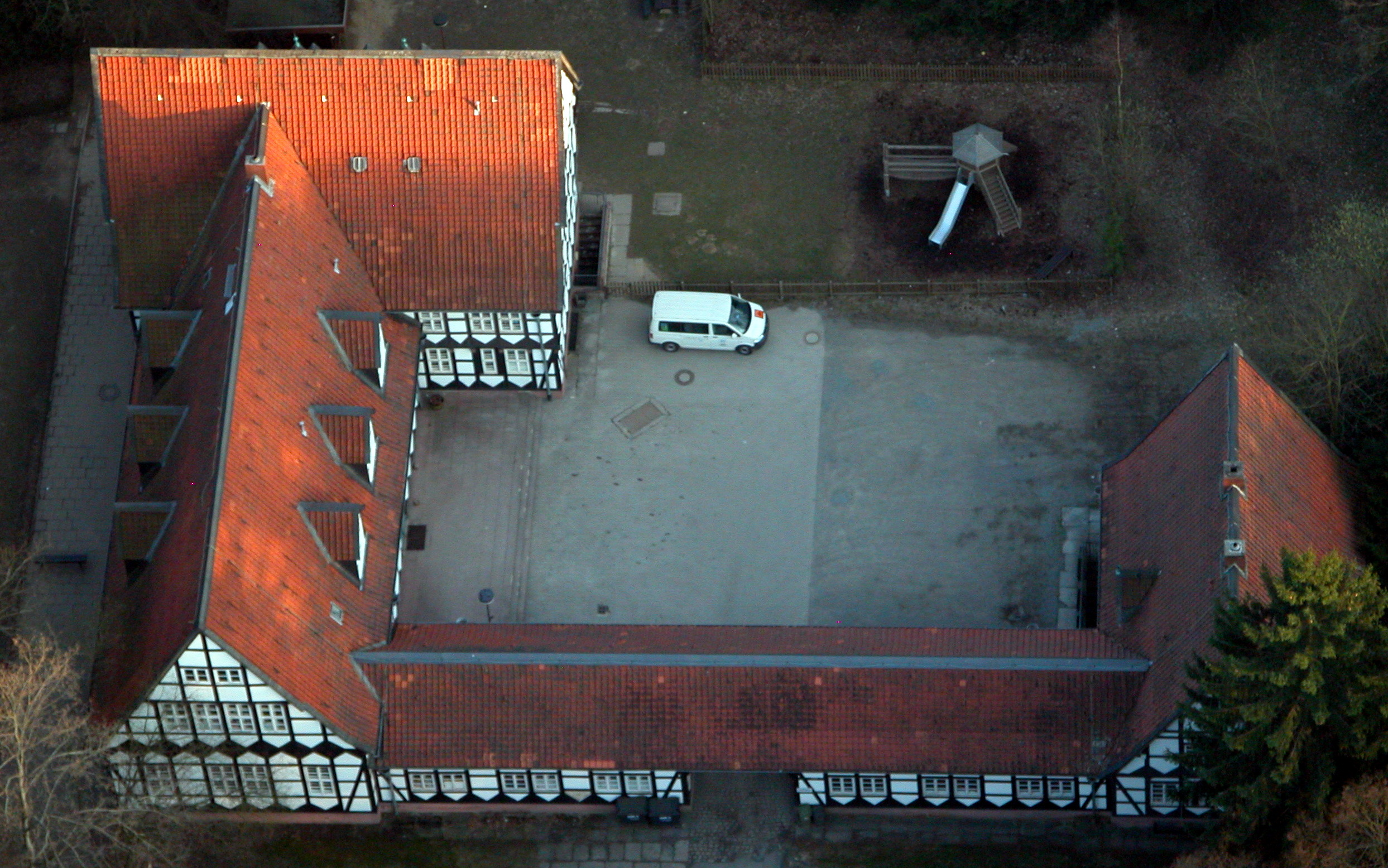 Braunschweig, Luftaufnahme des ehemaligen Reichsjägerhofs „Hermann Göring“.